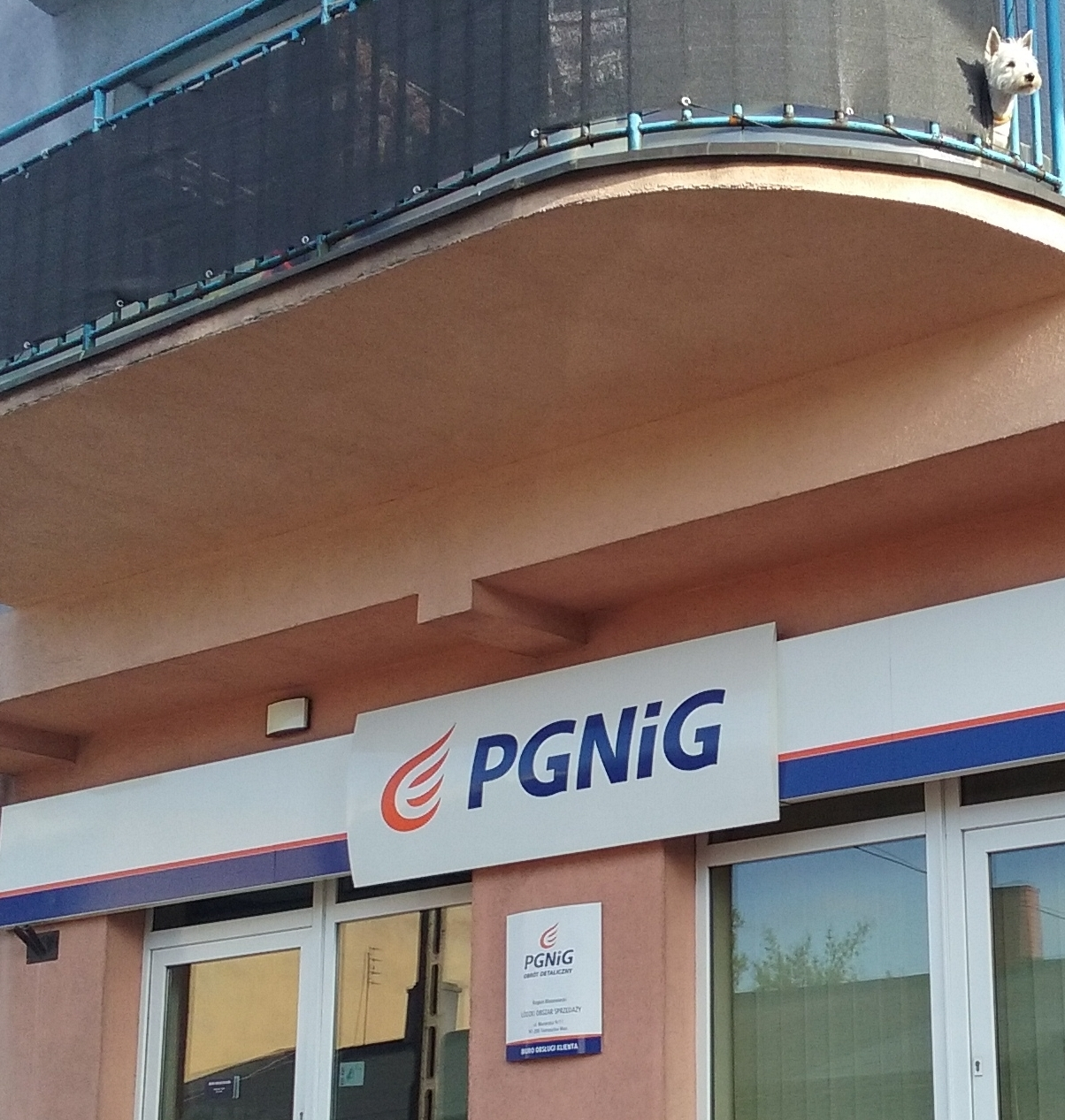 Tomaszów Mazowiecki w województwie łódzkim, PL, EU. Lokalny odział Polskiego Górnictwa Naftowego i Gazownictwa (PGNiG), CC0